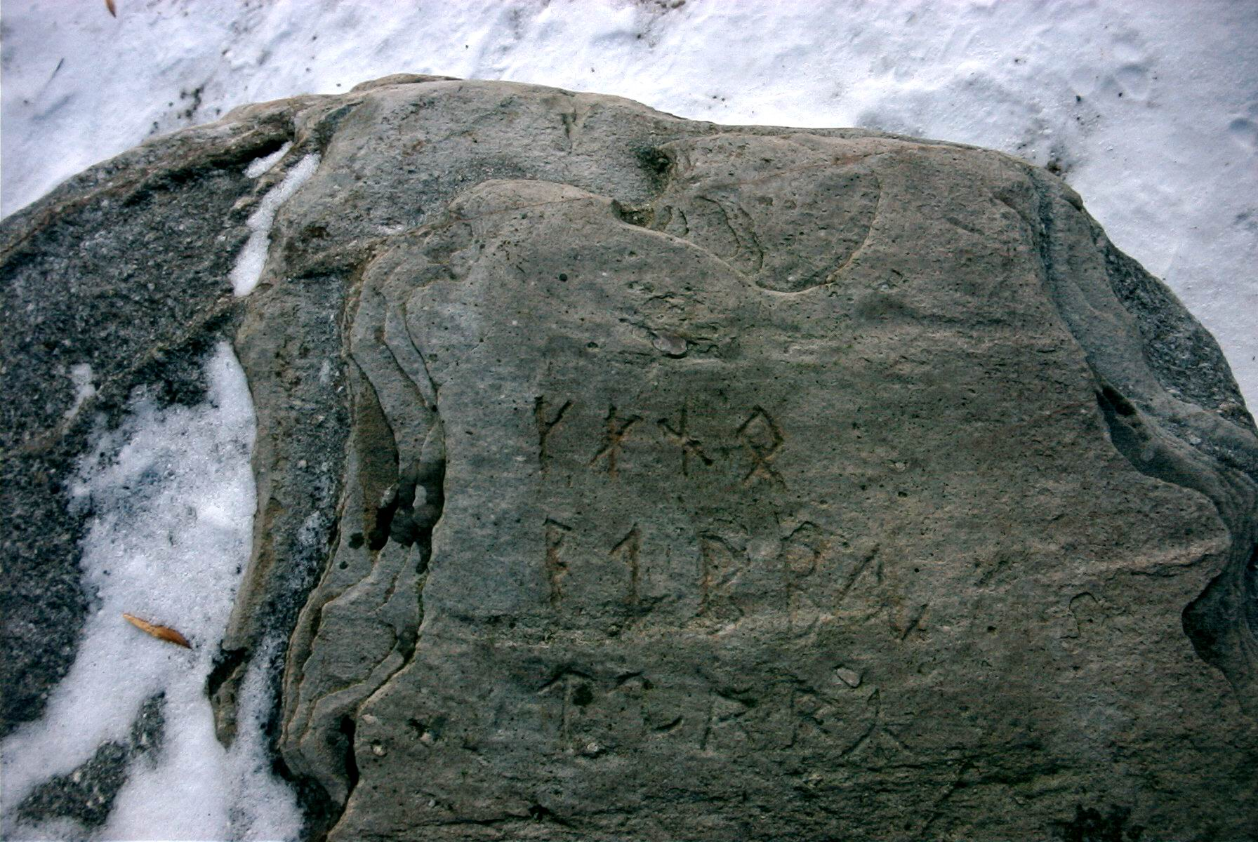 Seltener Runenstein im Gesteinsgarten Neu Pudagla